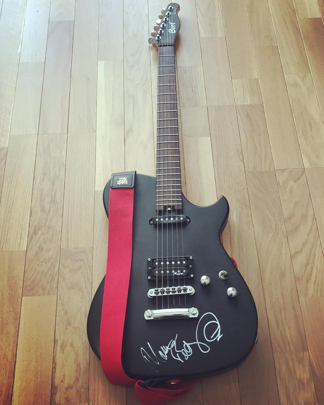 Гітара Cort MBC-1 Matthew Bellamy Signature з автографом.